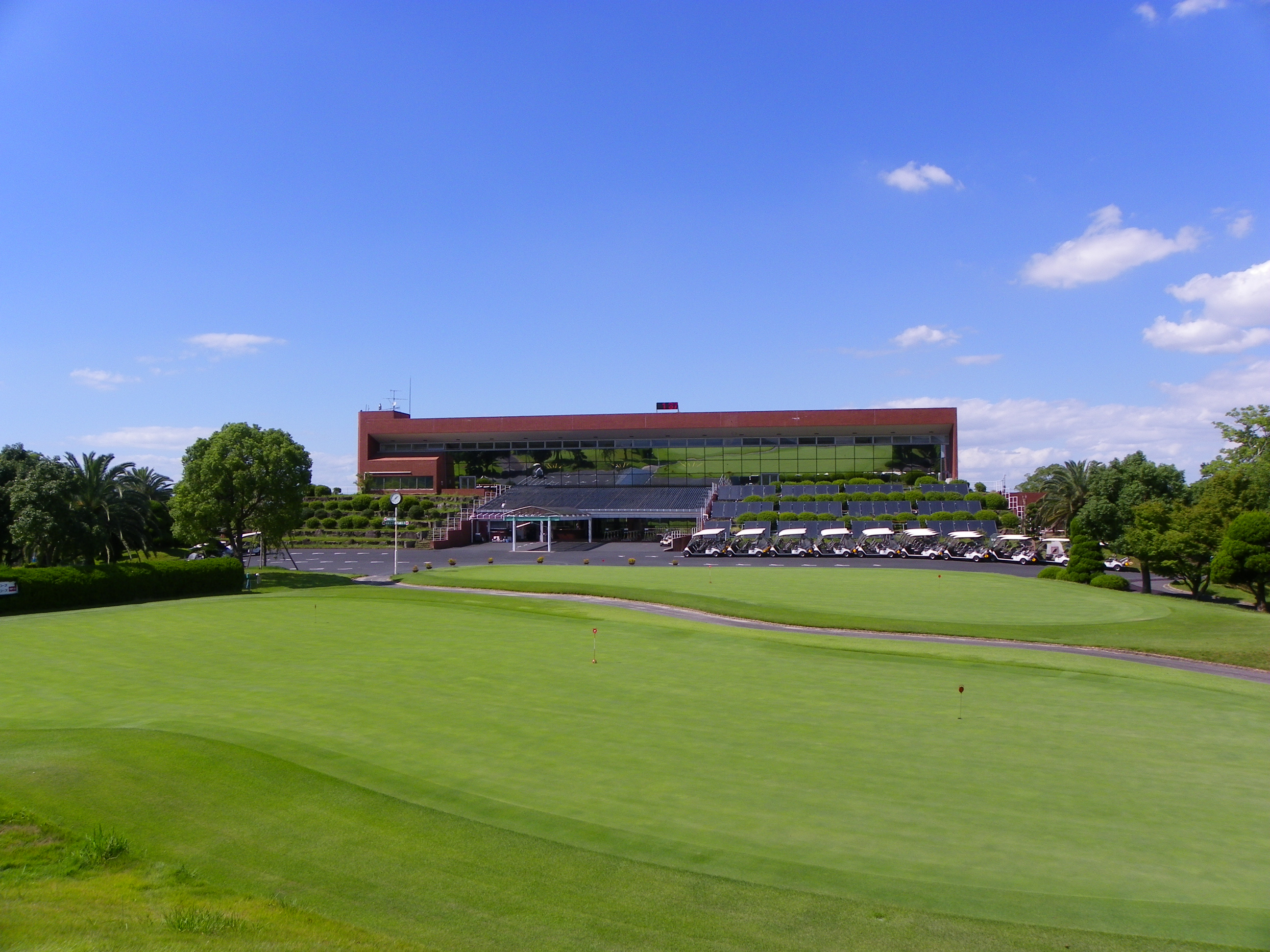 泉ヶ丘カントリークラブのクラブハウス全景です。葛城・岩湧・金剛の3コースへは、2階ロビーからのスタートとなります。